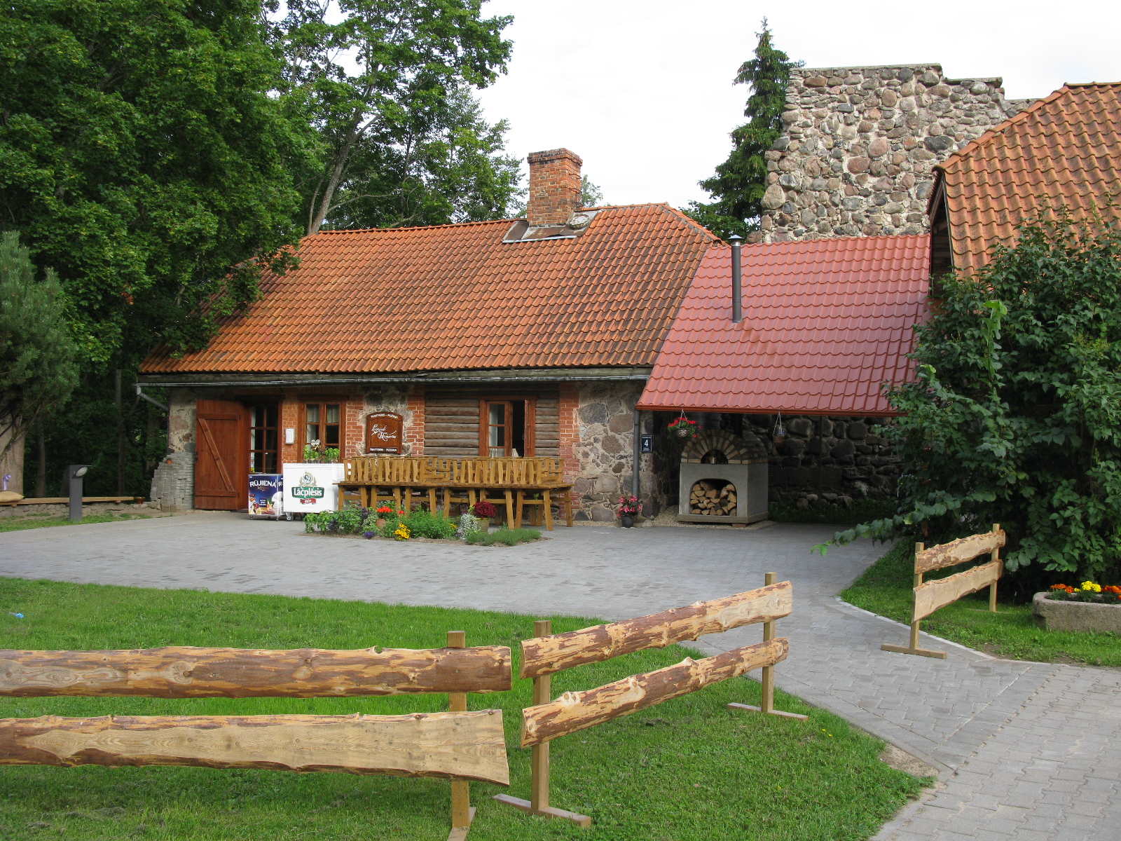 Mõisaaegne abihoone ja mantelmüüri lõik jäävad juba pealinnuse alale. Vanas restaureeritud hoones on kena kohvik.